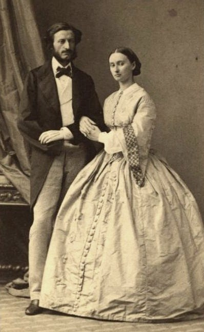 Елизавета Григорьевна и Михаил Сергеевич Волконские